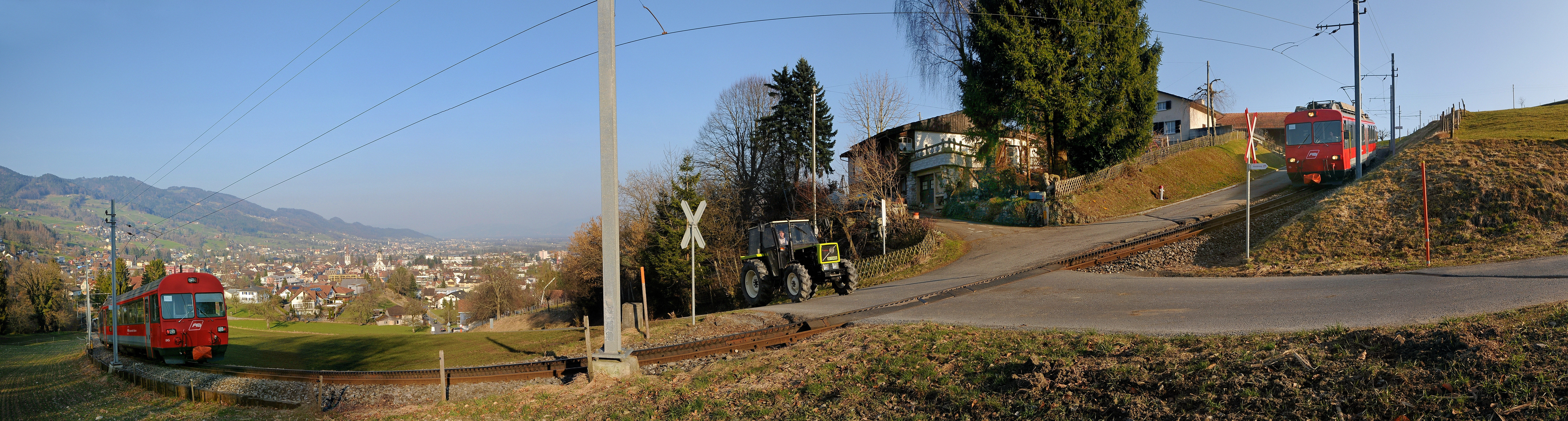 Hier, an der Alten Schloßstraße, fährt die Appenzeller Bahn auf der Strecke Altstätten-Gais in einer Meterspur mit Zahnradabschnitten talwärts nach Altstätten. Das Panorama zeigt den Zug von Vorne und von Hinten! NOTE: This image is a panorama consisting of multiple frames that were merged or stitched in software. As a result, this image necessarily underwent some form of digital manipulation. These manipulations may include blending, blurring, cloning, and colour and perspective adjustments. As a result of these adjustments, the image content may be slightly different from reality at the points where multiple images were combined. This manipulation is often required due to lens, perspective, and parallax distortions.